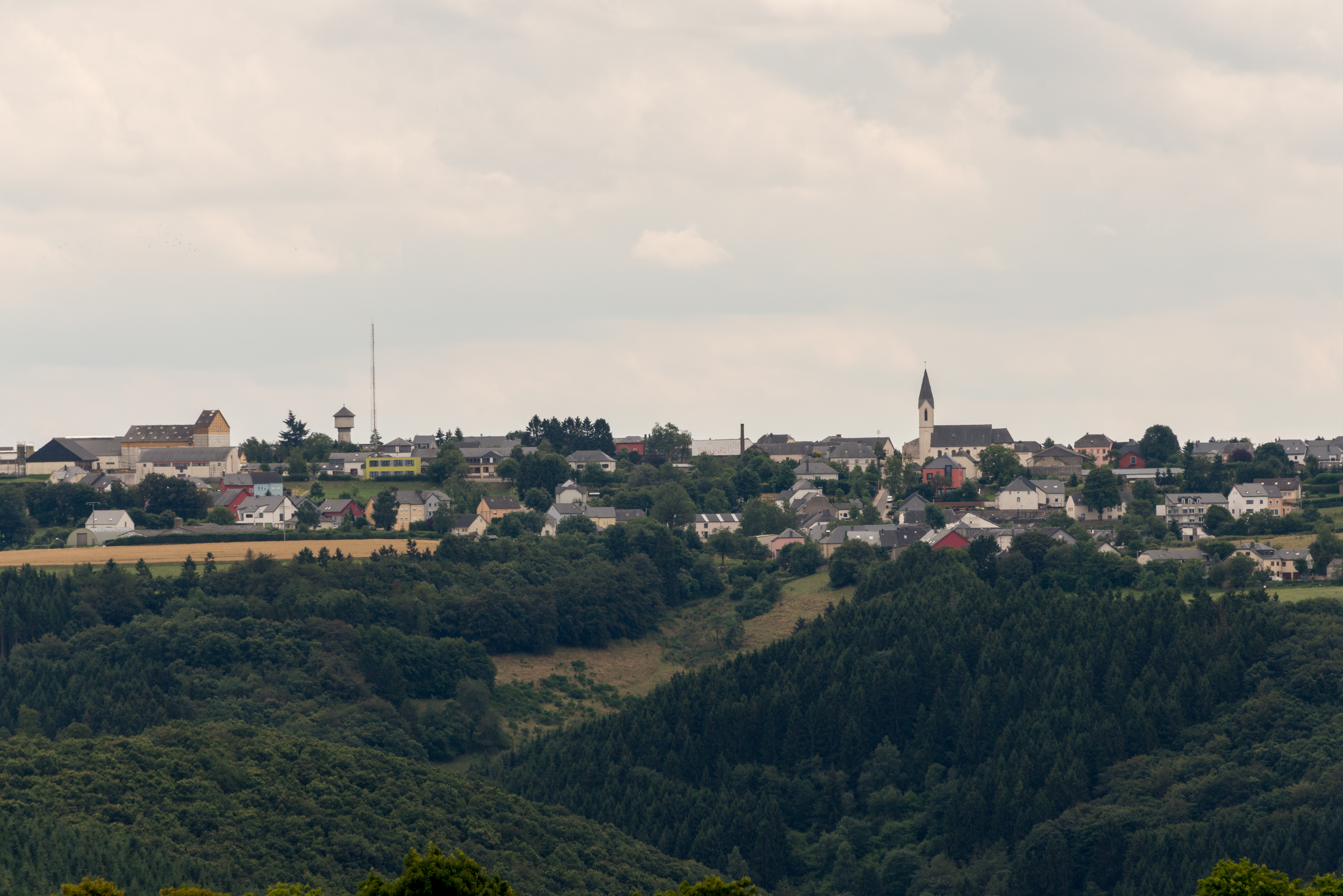 Vue op Heischent vu Géisdref, 'Op der Minn', bei der Weekapell .